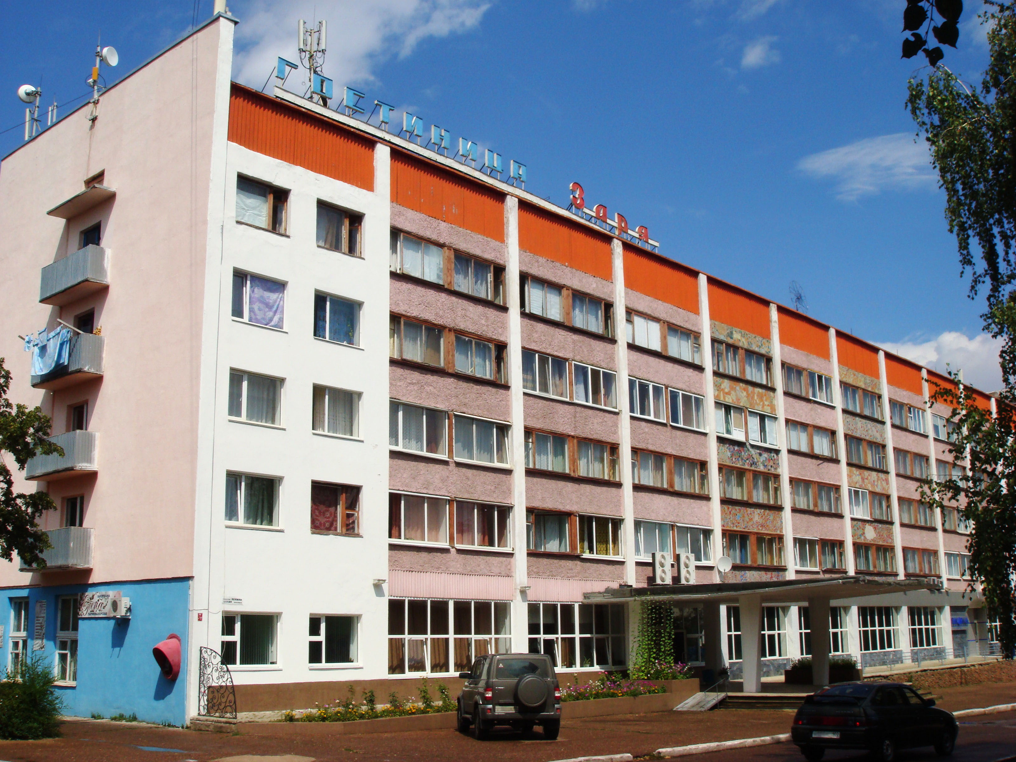 Гостиница "Заря" в Ишимбае